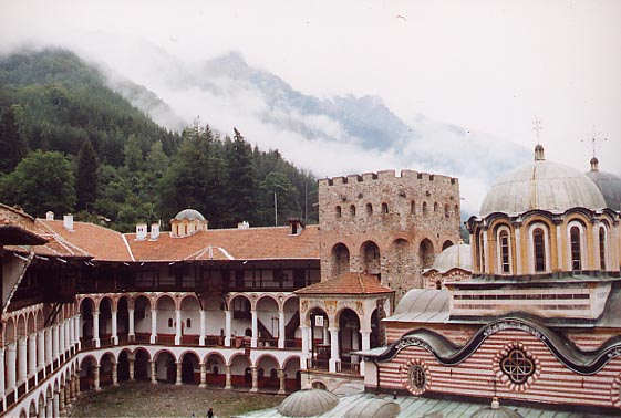 Rila Monastery